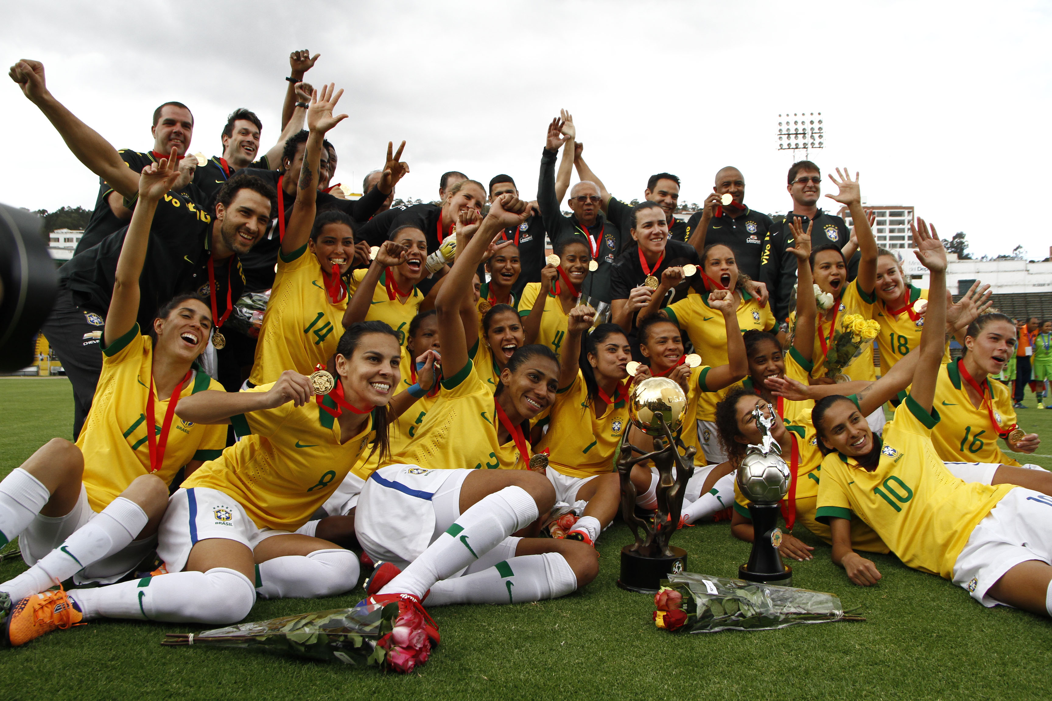 Quito, 28 sep (Andes).- La selección brasileña femenina de fútbol se proclamó Campeona de la Copa América de Fútbol Ecuador 2014. Foto: Micaela Ayala V./Andes